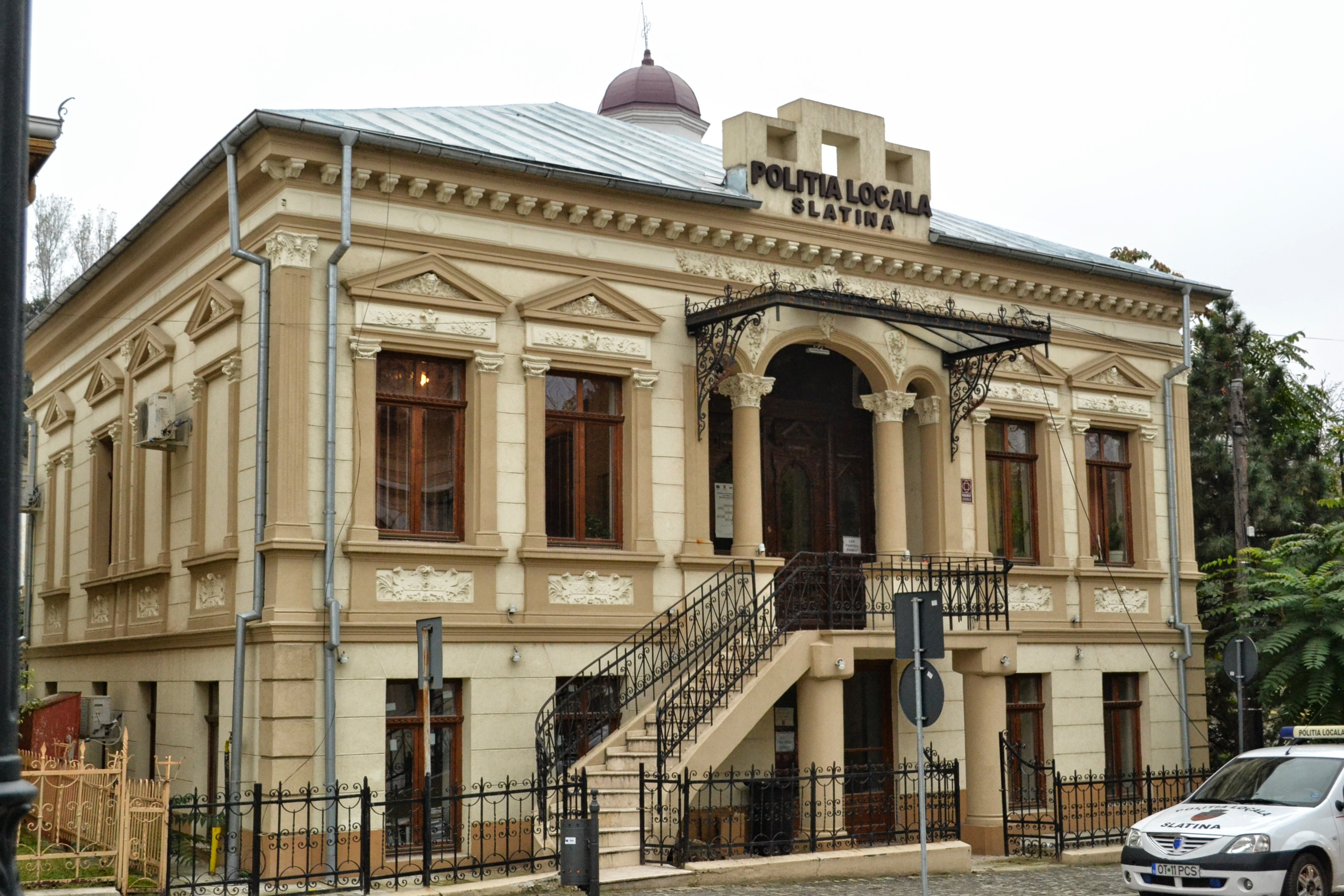 Casa Vereș în noiembrie 2014.